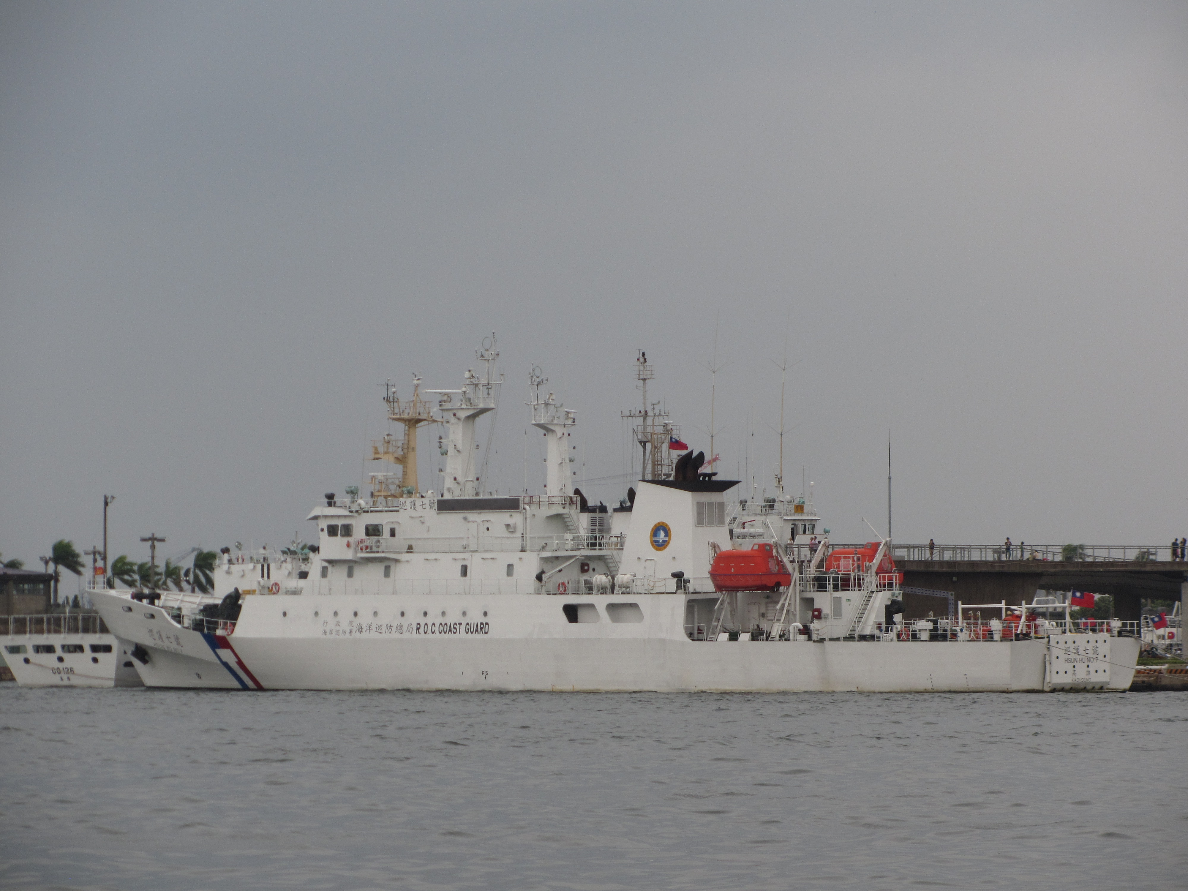 行政院海岸巡防署海洋巡防總局巡護七號艦